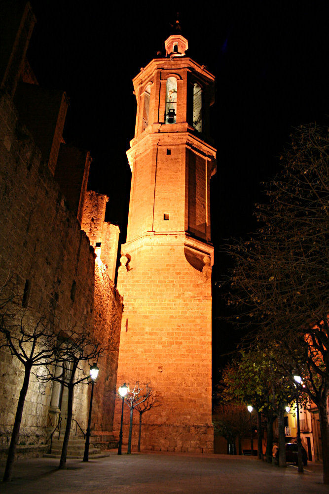 Església d'Esparreguera